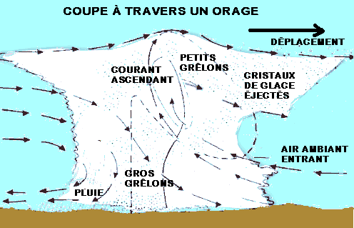 Coupe verticale d'un orage de grêle avec l'air entrant soulevée en altitude et formant les grêlons